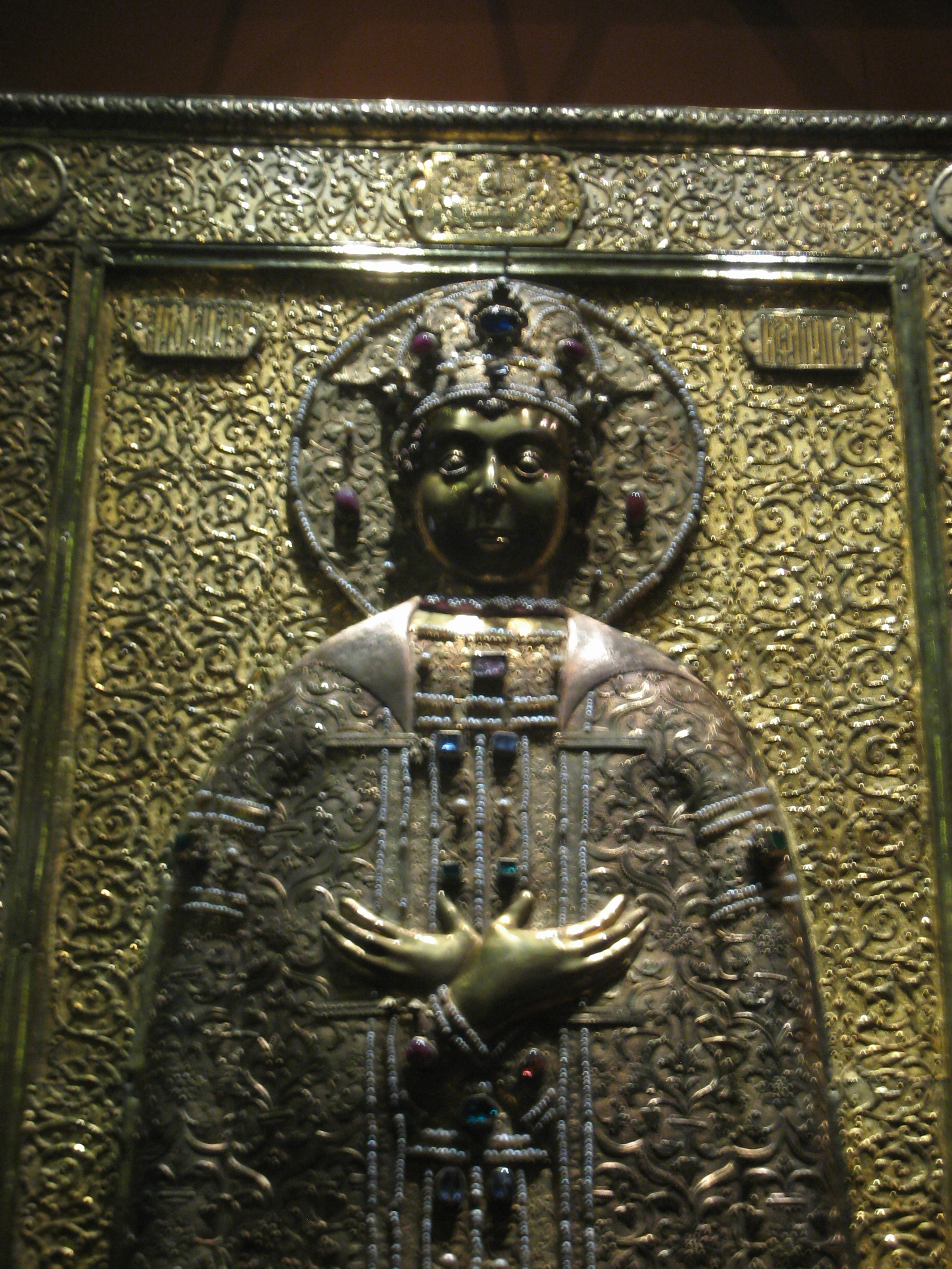 Dmitry Uglitsky and Kirill Belozersky rizas2.jpg Крышка раки царевича Дмитрия. Москва. Серебряная палата. 1628-1630. Вклад царя Михаила Федоровича в Архангельский собор.